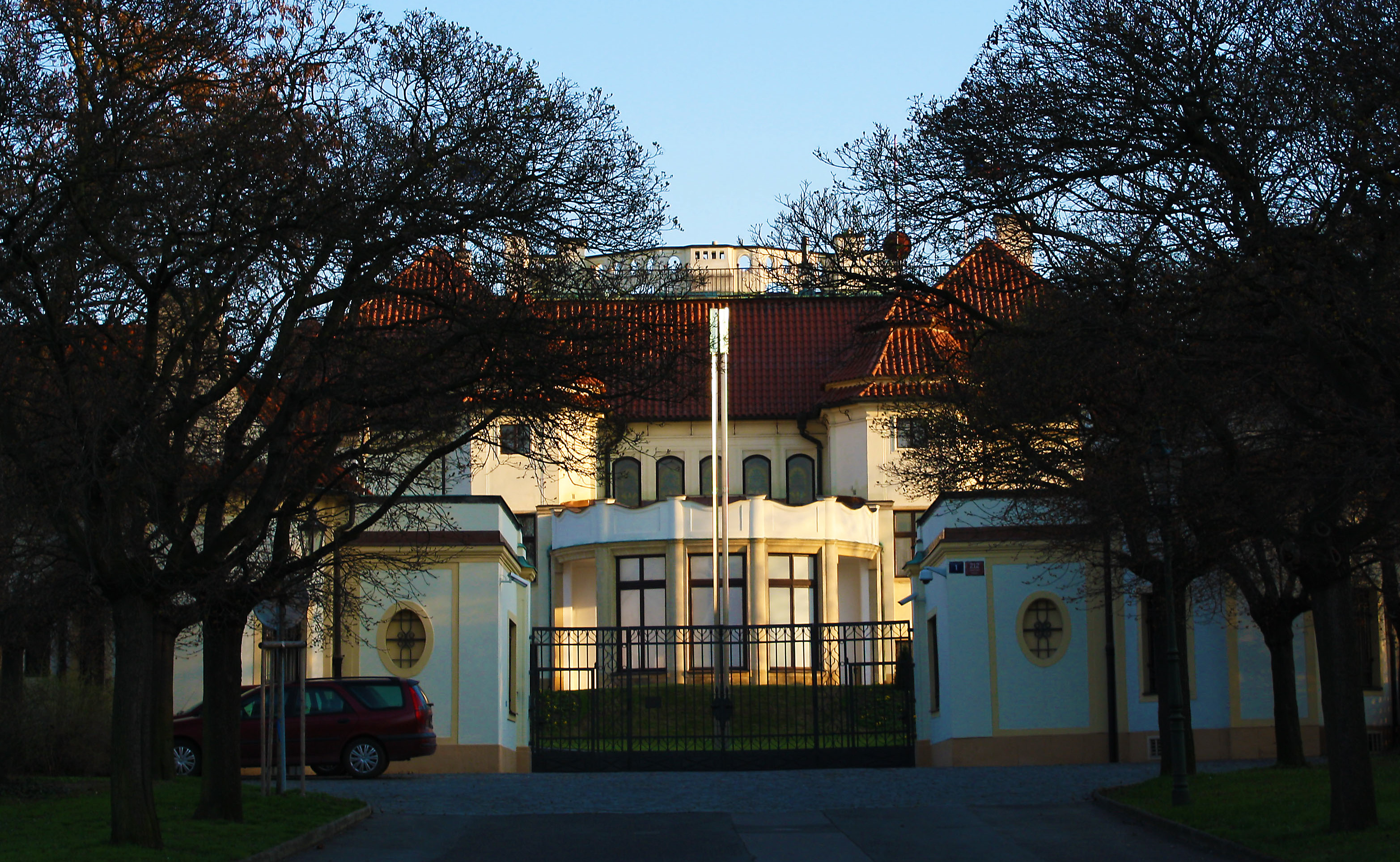 vila Kramářova